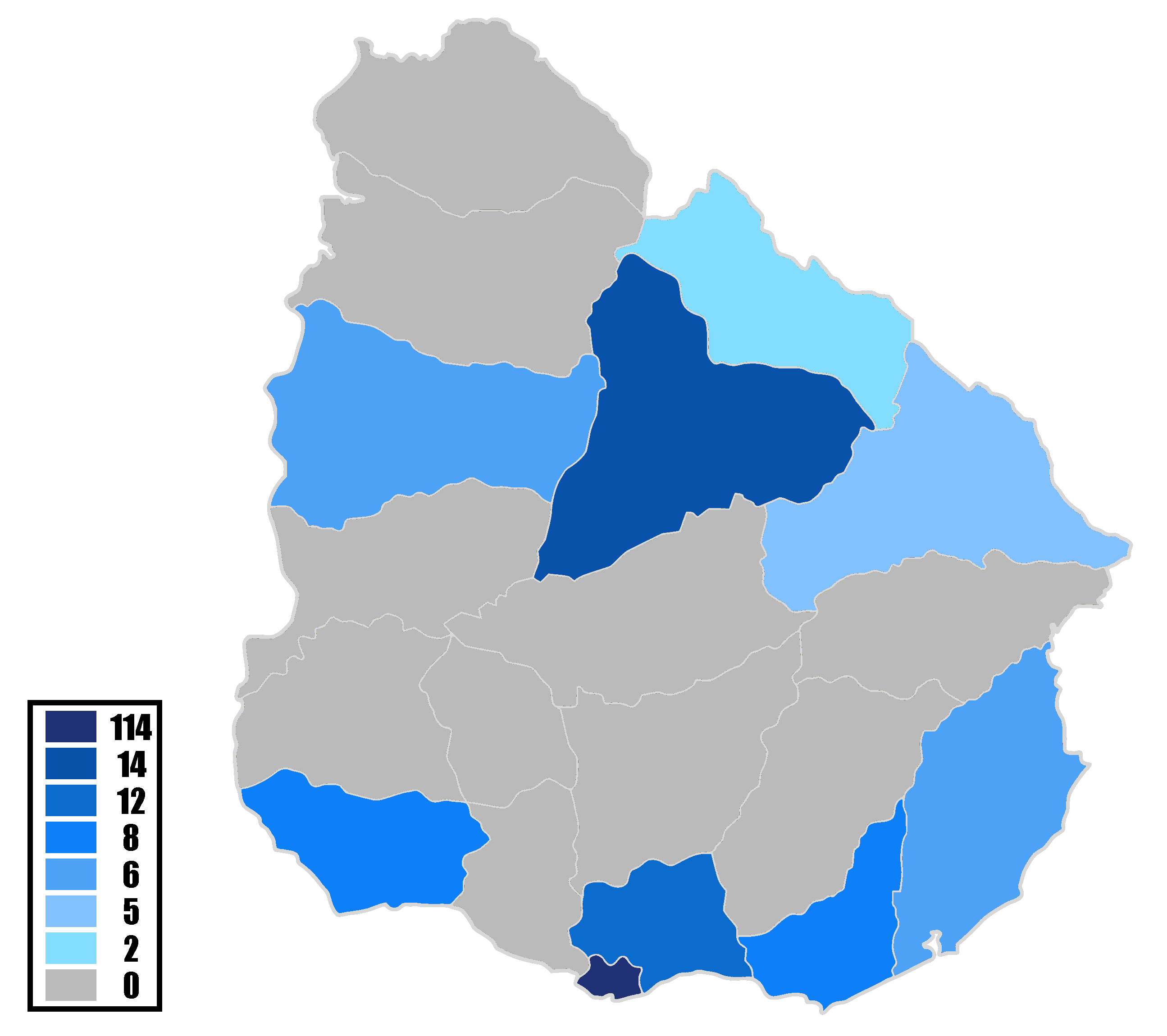 Mapa de Uruguay, que muestra a los departamentos que han participado del Campeonato Uruguayo de Primera División, desde su primera edición en 1900 hasta la fecha.